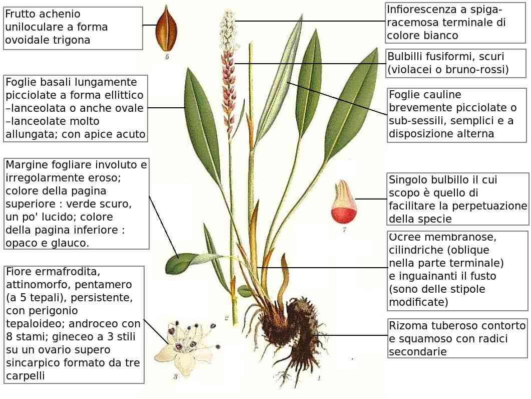 Persicaria vivipara